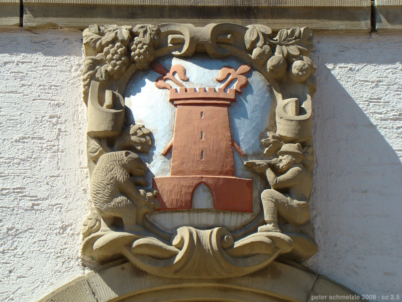 Wappenstein mit dem Gemeindewappen der ehem. Gemeinde Weiler am Rathaus in Sinsheim-Weiler